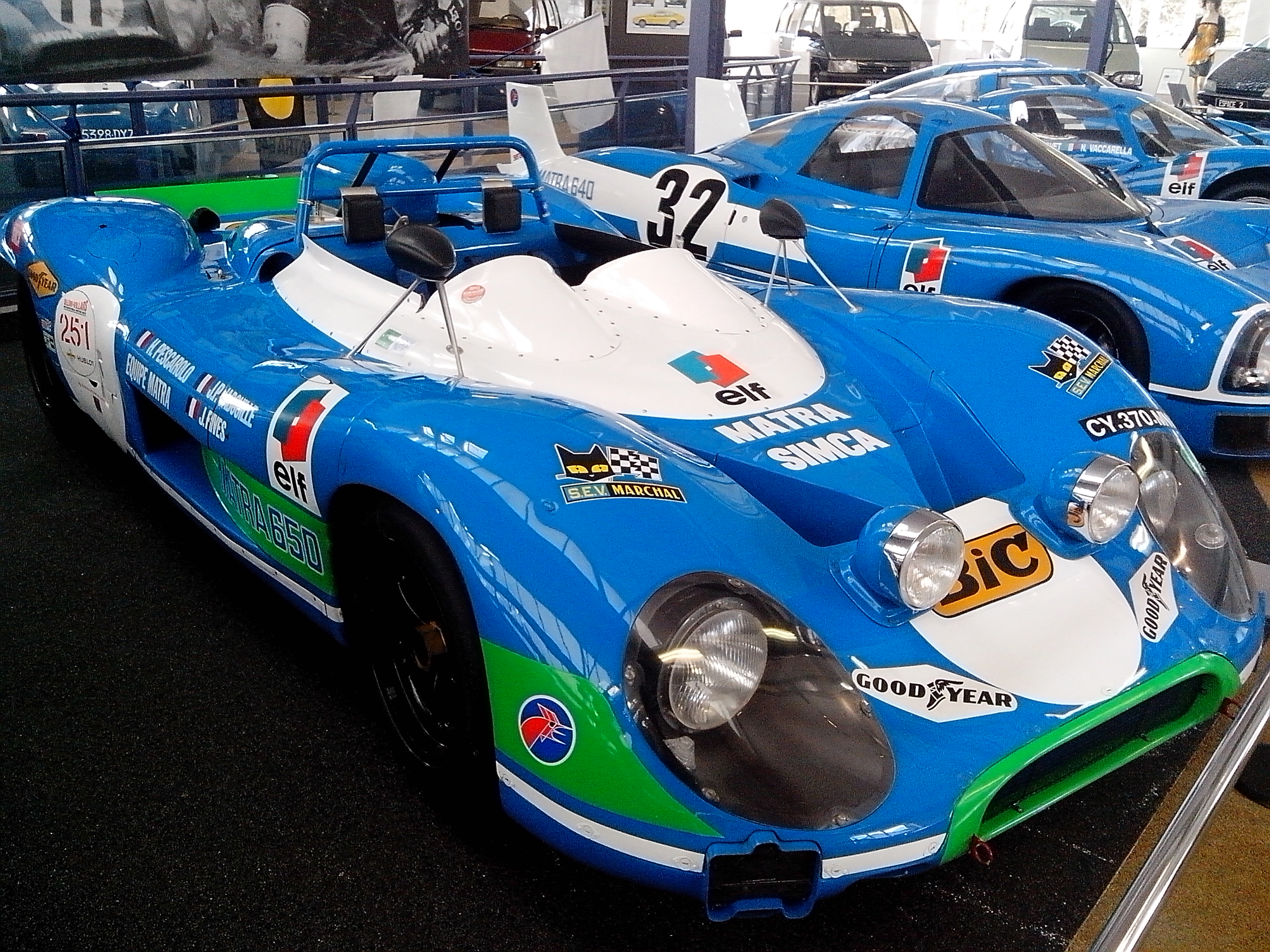 Collection de l'Espace Automobiles Matra